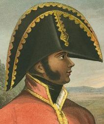 Portrait du général Alexandre Pétion.